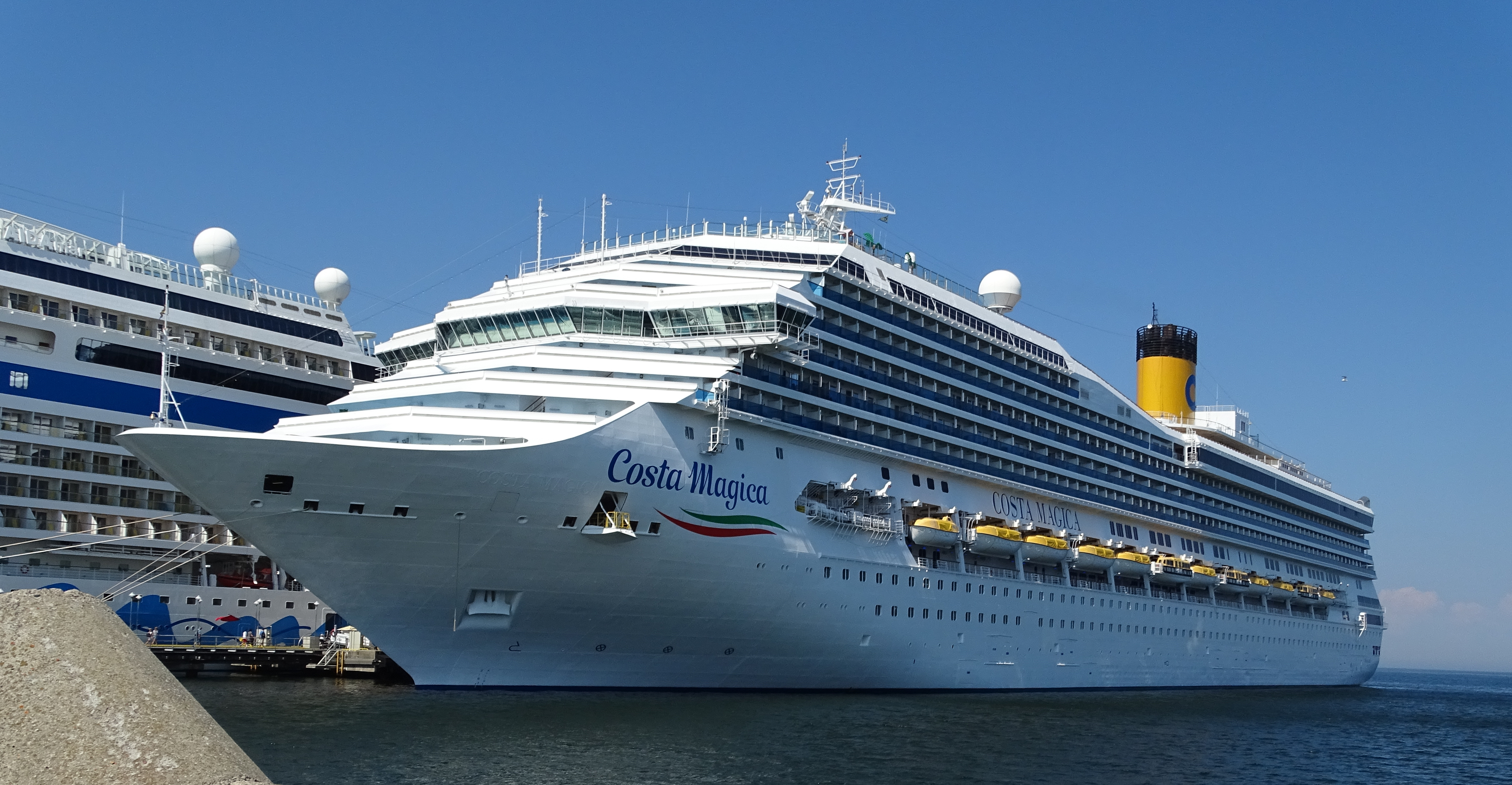 Costa Magica in Tallinn, Estland.